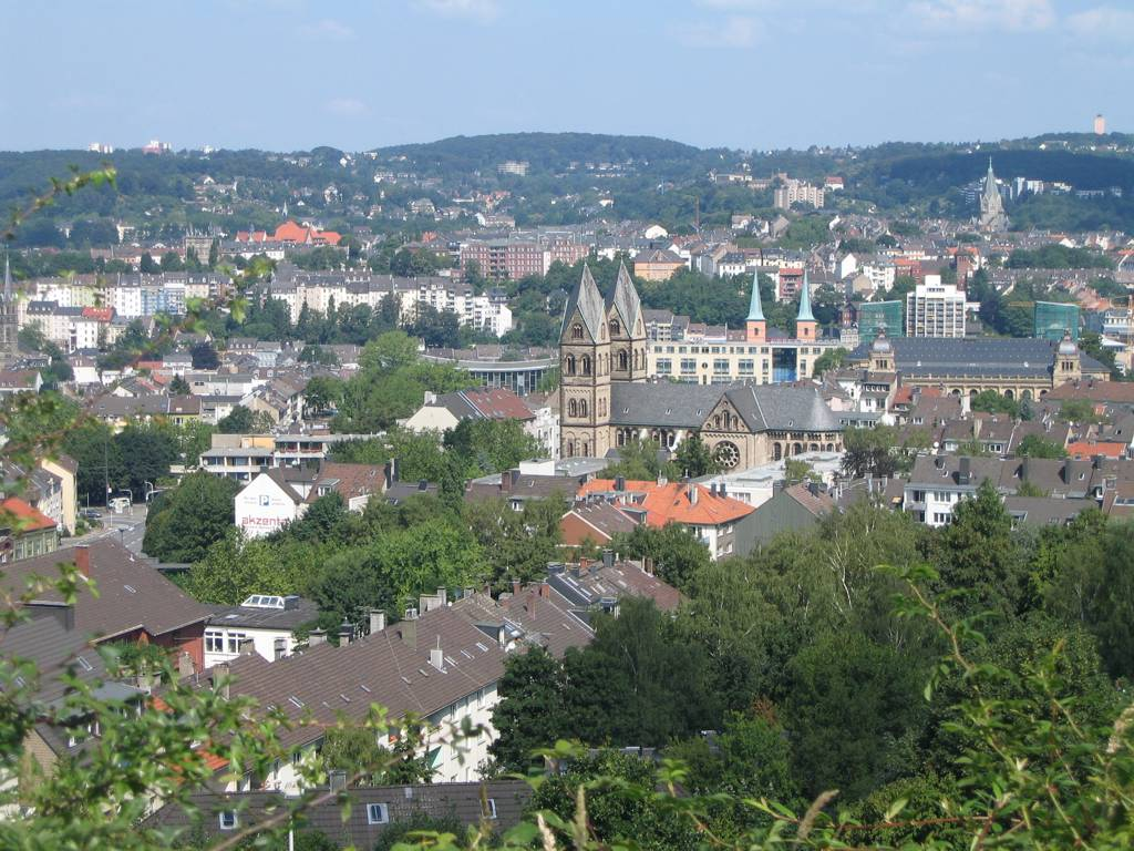 Blick auf Wuppertal-Elberfeld-West, Hügel im Hintergrund (von links) Nützenberg, Hasenberg, Uellendahler Berg, Sommer 2004. Kirchen: mittig Sankt Suitbertus, dahinter (rosa) Laurentiuskirche, dahinter, oberes rechtes Viertel: die Friedhofkirche. Weitere markante Gebäude: Oberer rechter Bildrand: Wasserturm Atadösken, rechter Bildrand, mittig Stadthalle